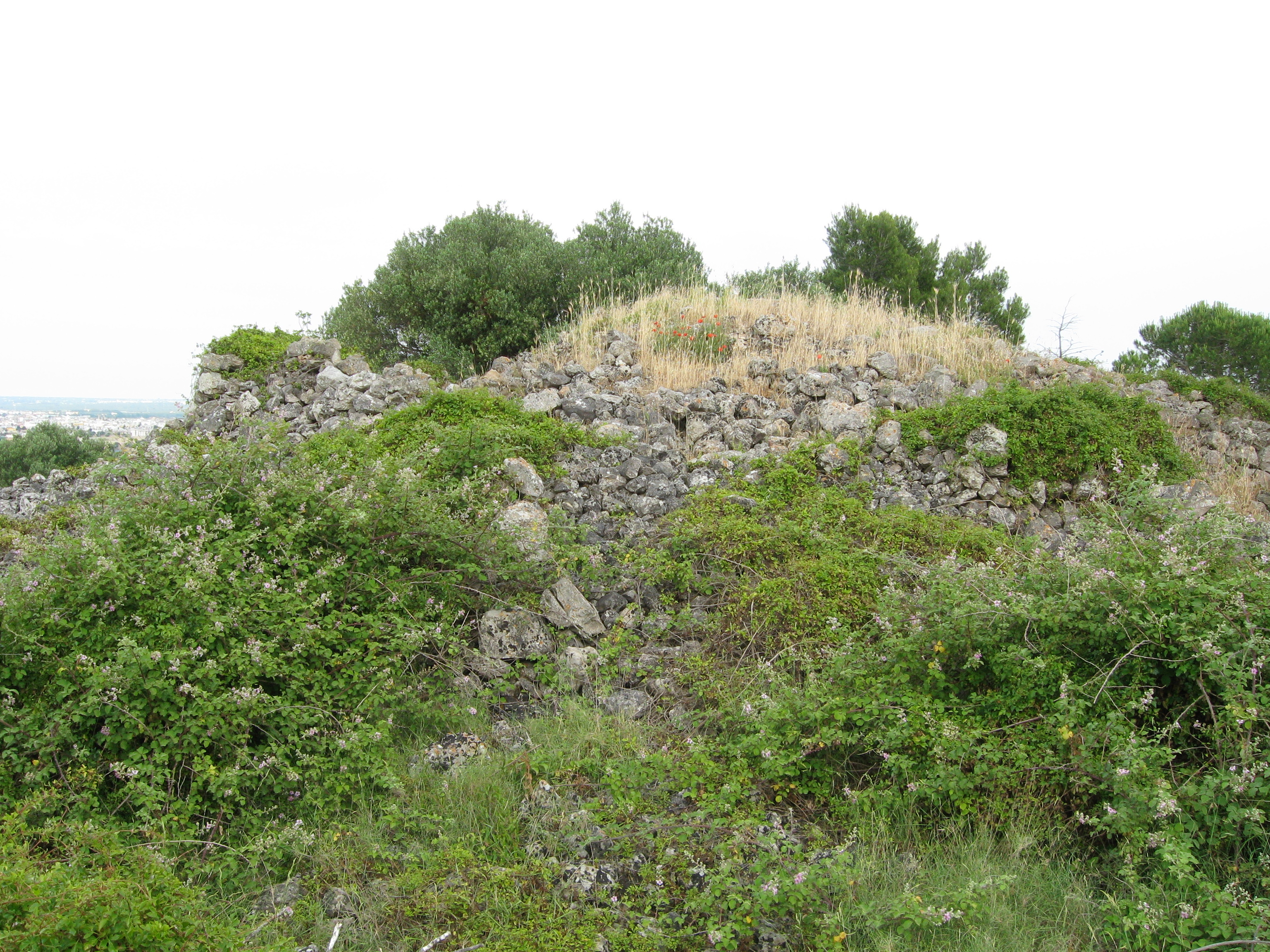 la specchia presente sul monte Li Specchi, la collina che sovrasta la piana di Racale